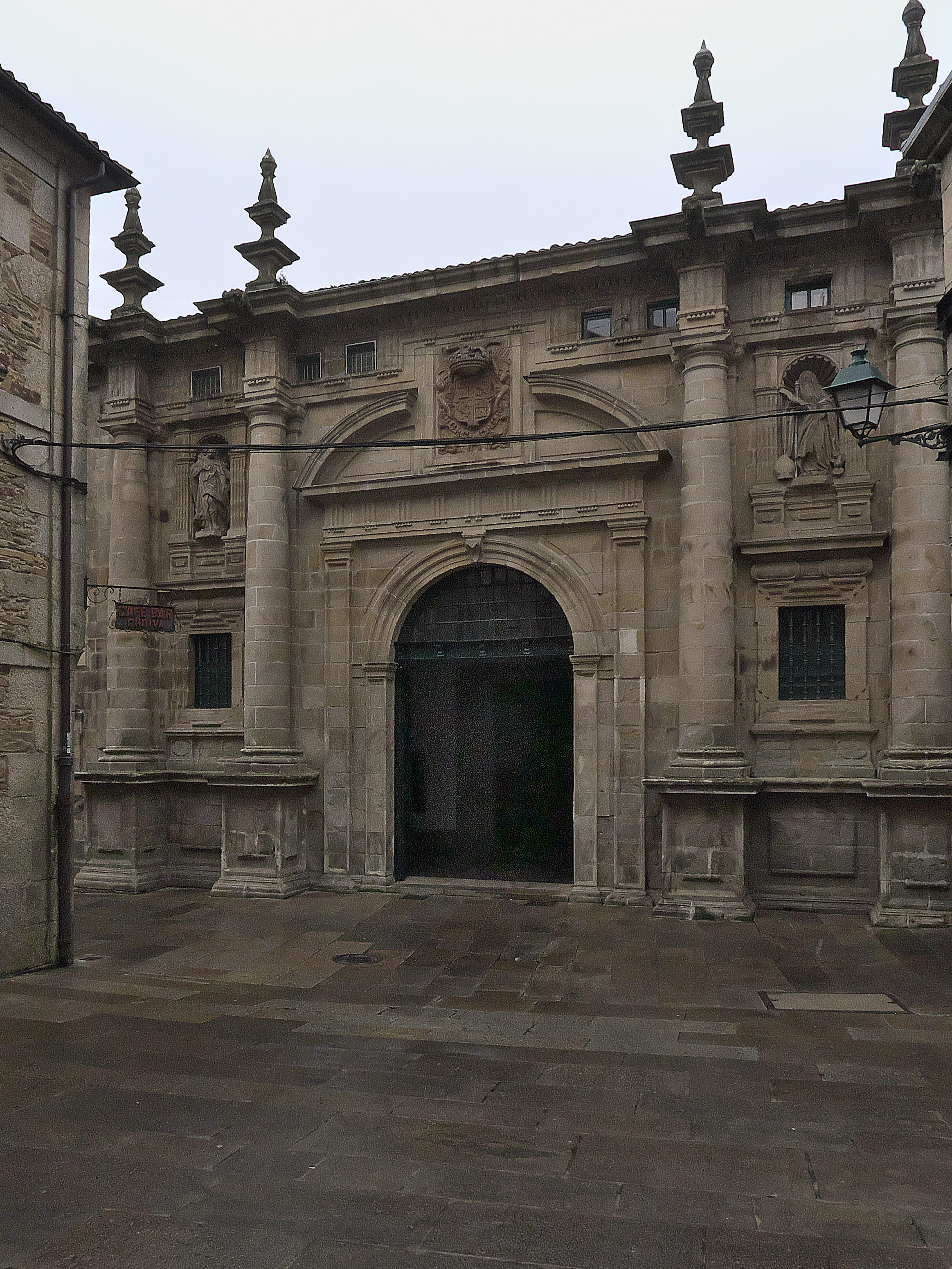 Portada de la portería del monasterio, obra de Melchor de Velasco Agüero.